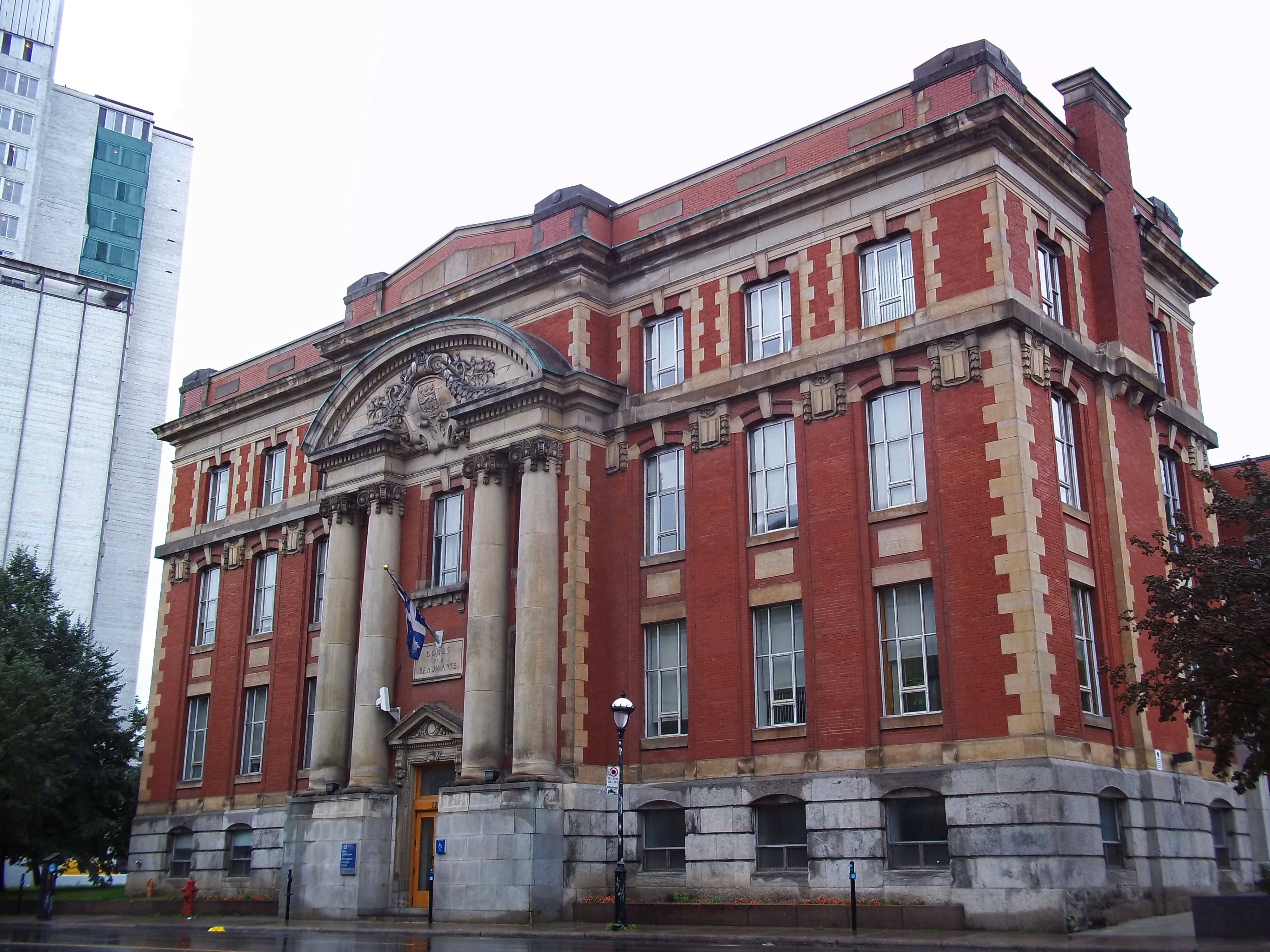 Commercial & Technical High School, 125, rue Sherbrooke Ouest, Montréal Aussi connu sous le nom de : École des Beaux-Arts UQAM-Pavillon des Arts Édifice Camille-Laurin Grand répertoire du patrimoine bâti de Montréal